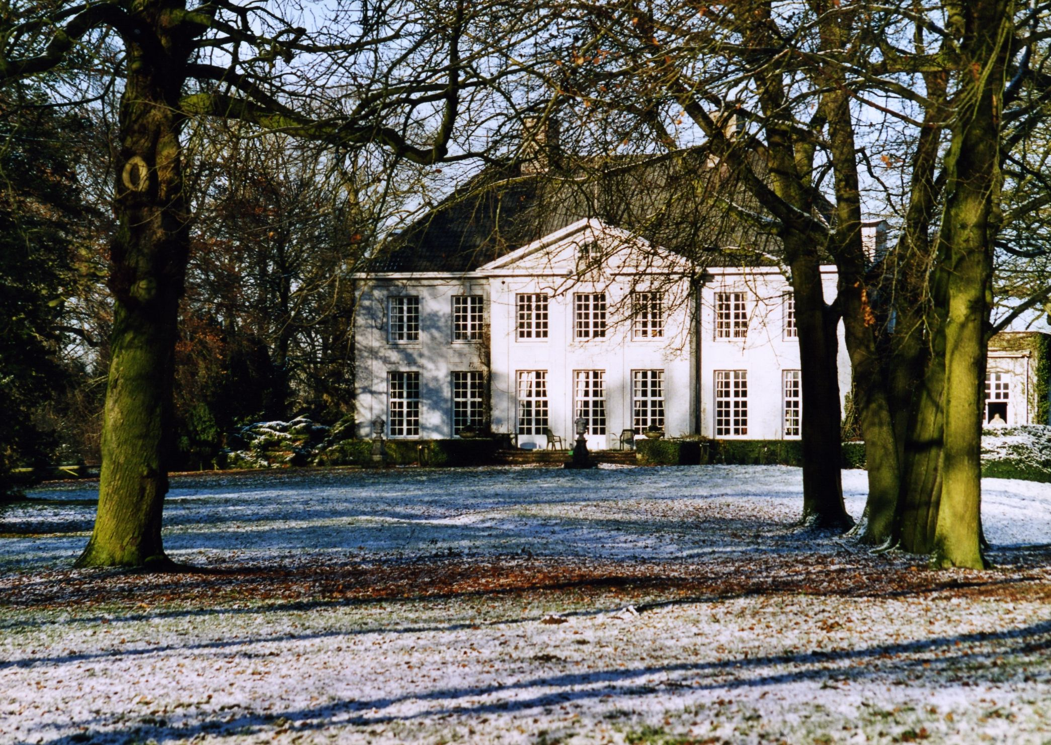 Huis Soeterbeek te Nuenen.